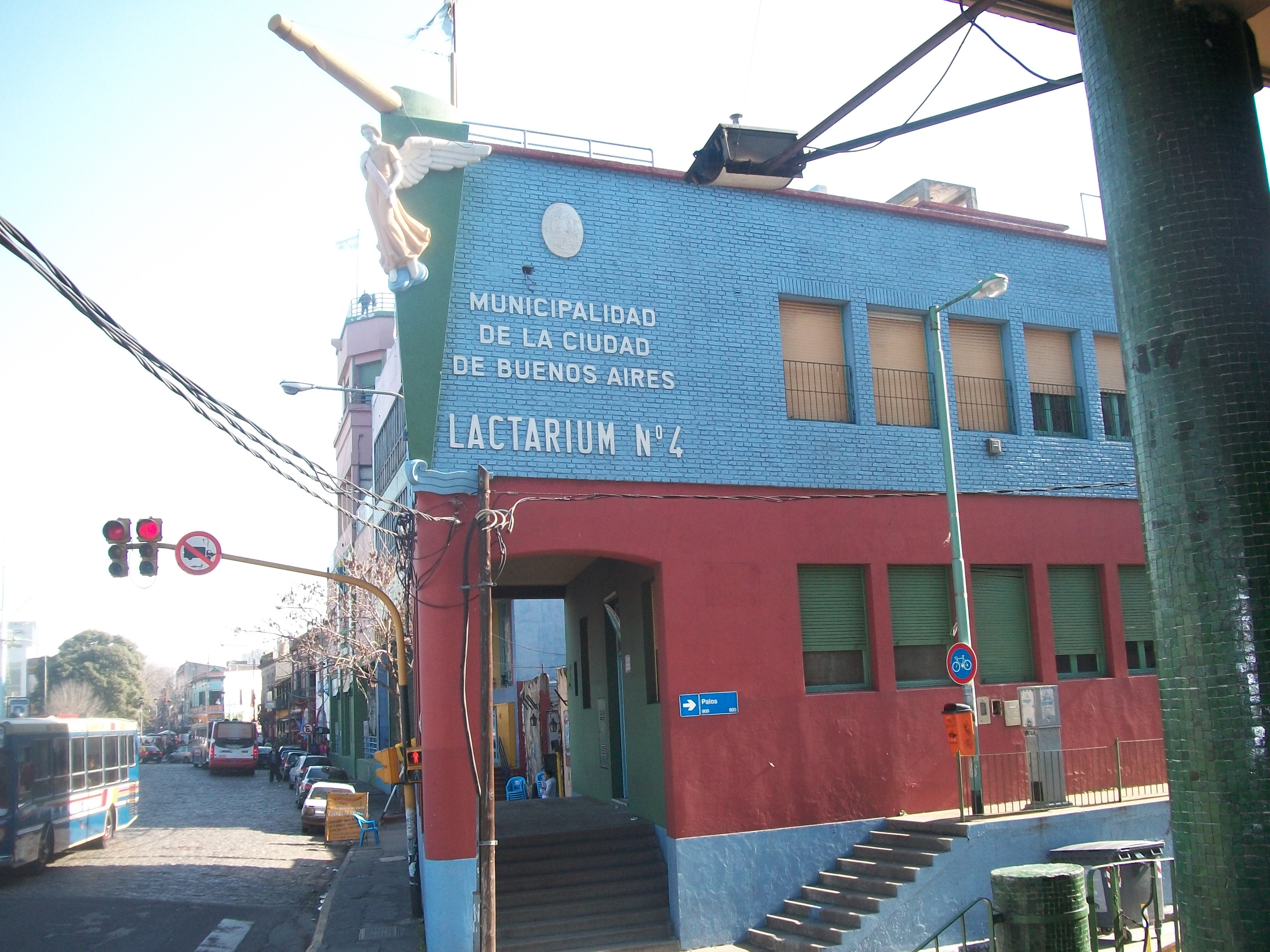 Lactario Municipal de La Boca